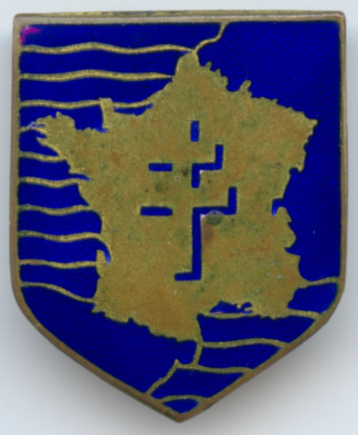 Insigne d'origine de la 2eDB